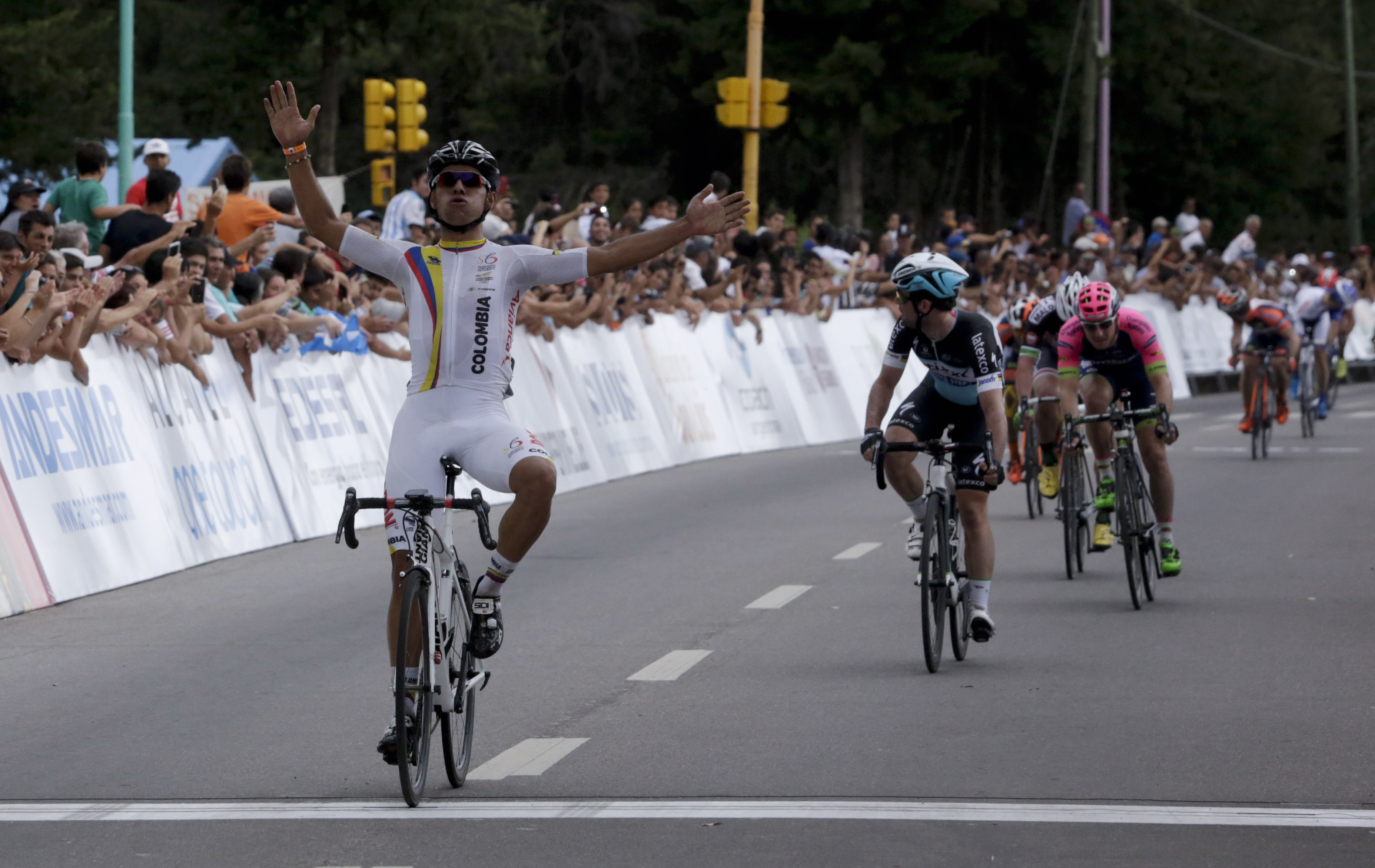 Fernando Gaviria, de Selección Colombia, gana la tercera etapa del tour de San Luis, Argentina, entre Concarán y Juana Koslay, 21 de enero de 2015. en segundo lugar llegó el británico Mark Cavendish y el italiano Sacha Modolo de tercero, repitiendo el podio de la primera etapa